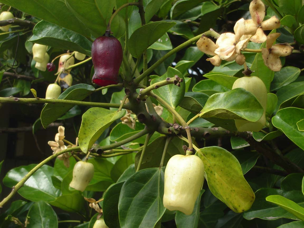 Atuna racemosa (Syn. Parinarium glaberrimum), (pipi tree in Tonga)